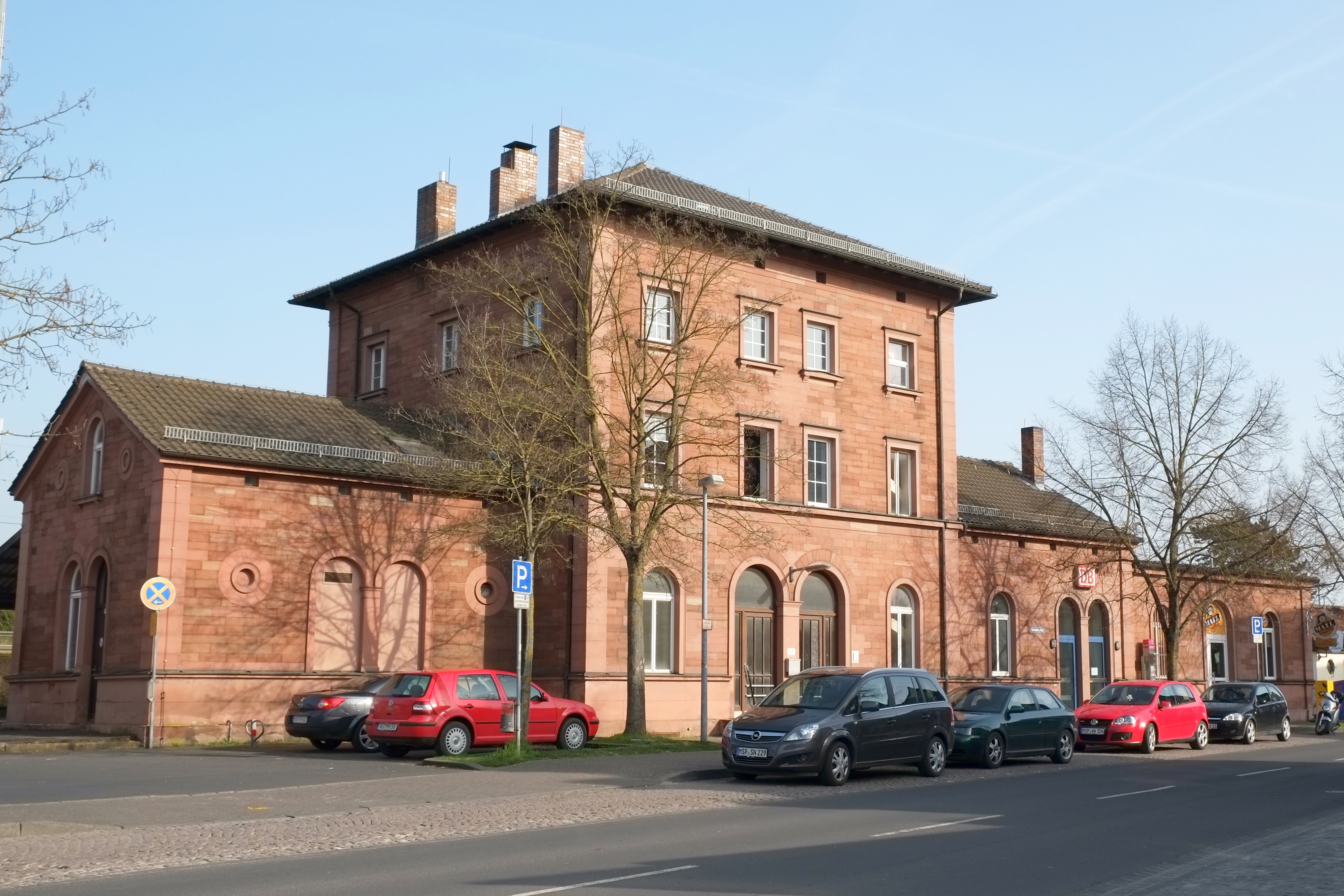 Bahnhof in Karlstadt im Main-Spessart-Kreis (Bayern, Deutschland)